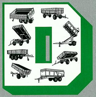 Darstellung Programm